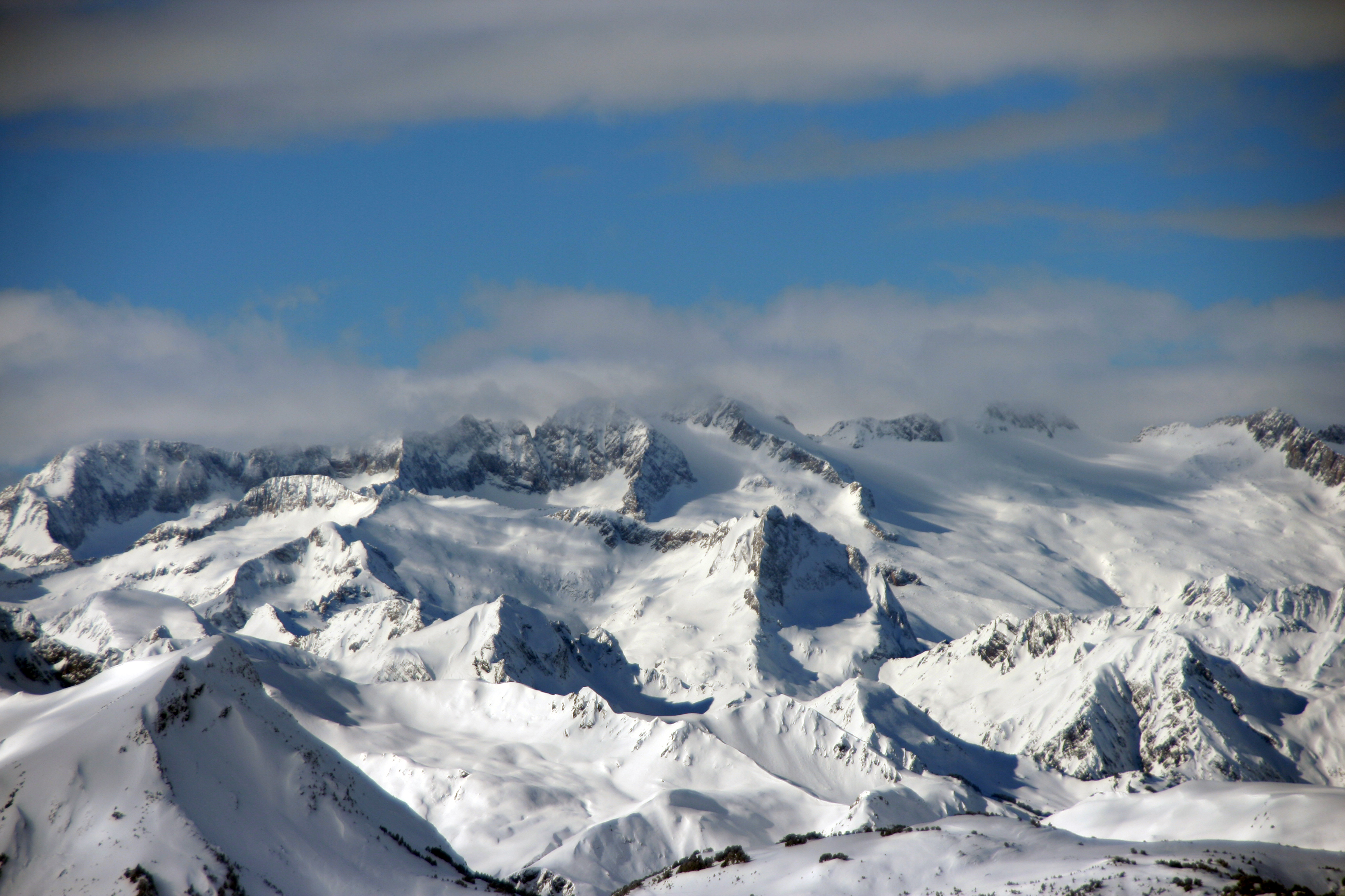 Vista del macizo de la maladeta desde Baqueira, en el Valle de Arán.